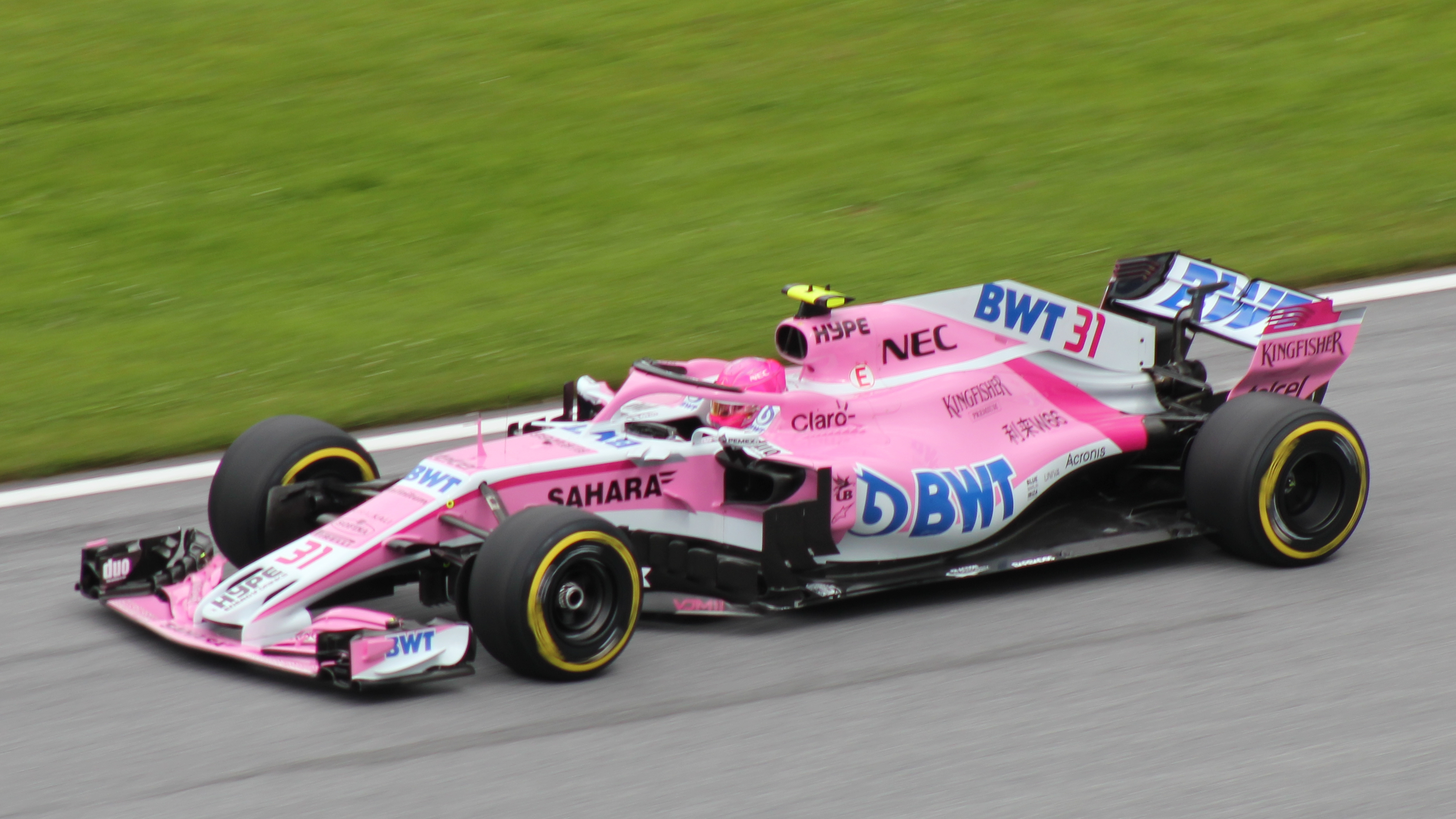 31 Ocon beim Rennwochenende in Österreich 2018